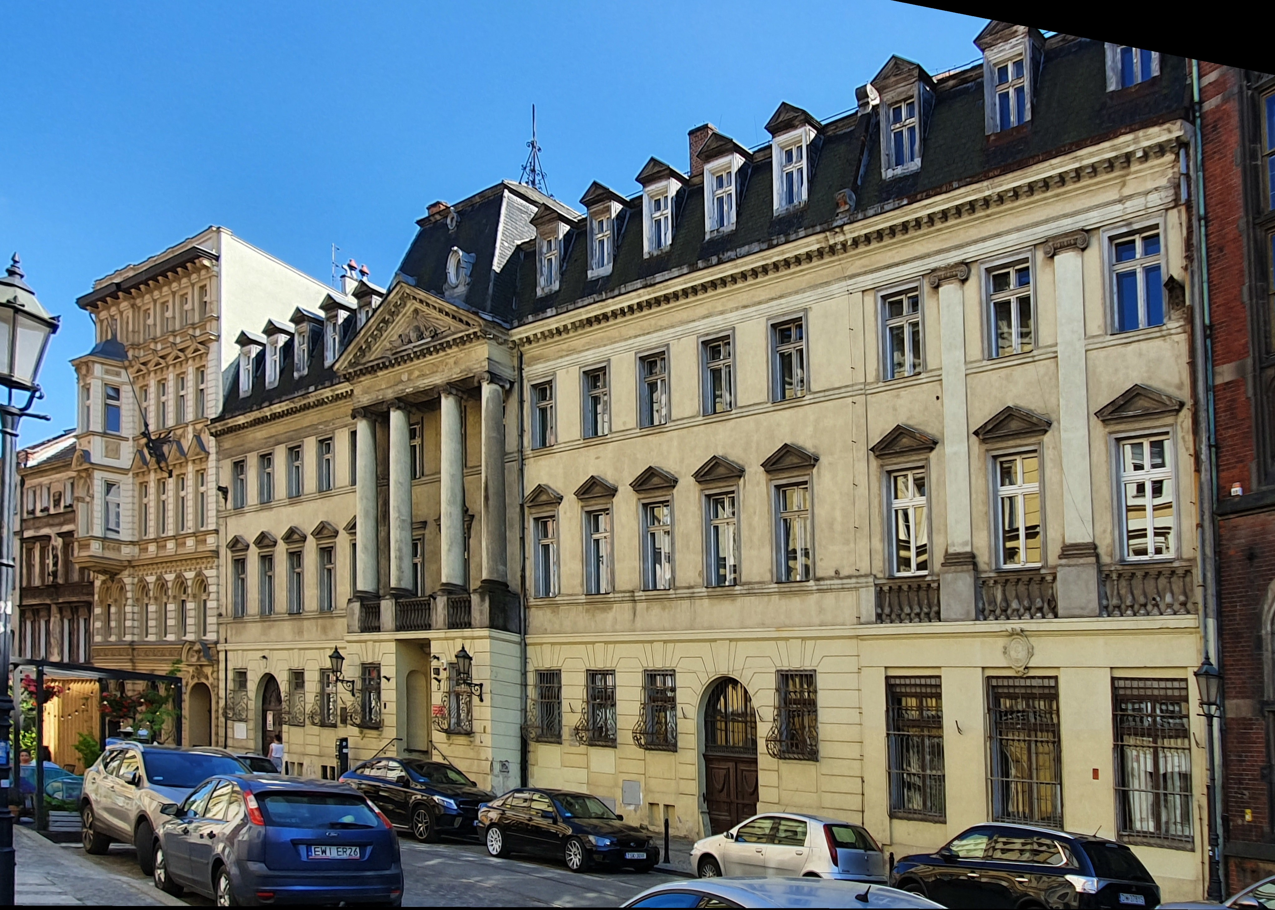 Wallenberg-Pachaly Palace in Wrocław